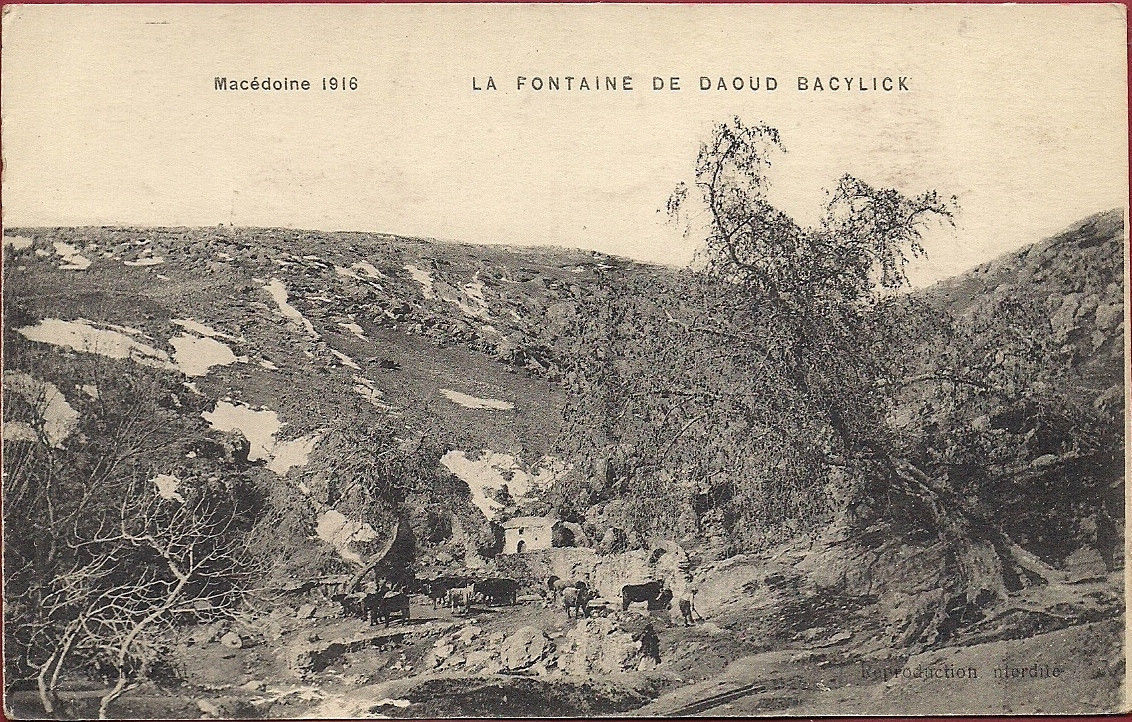 Даудбал през Първата световна война